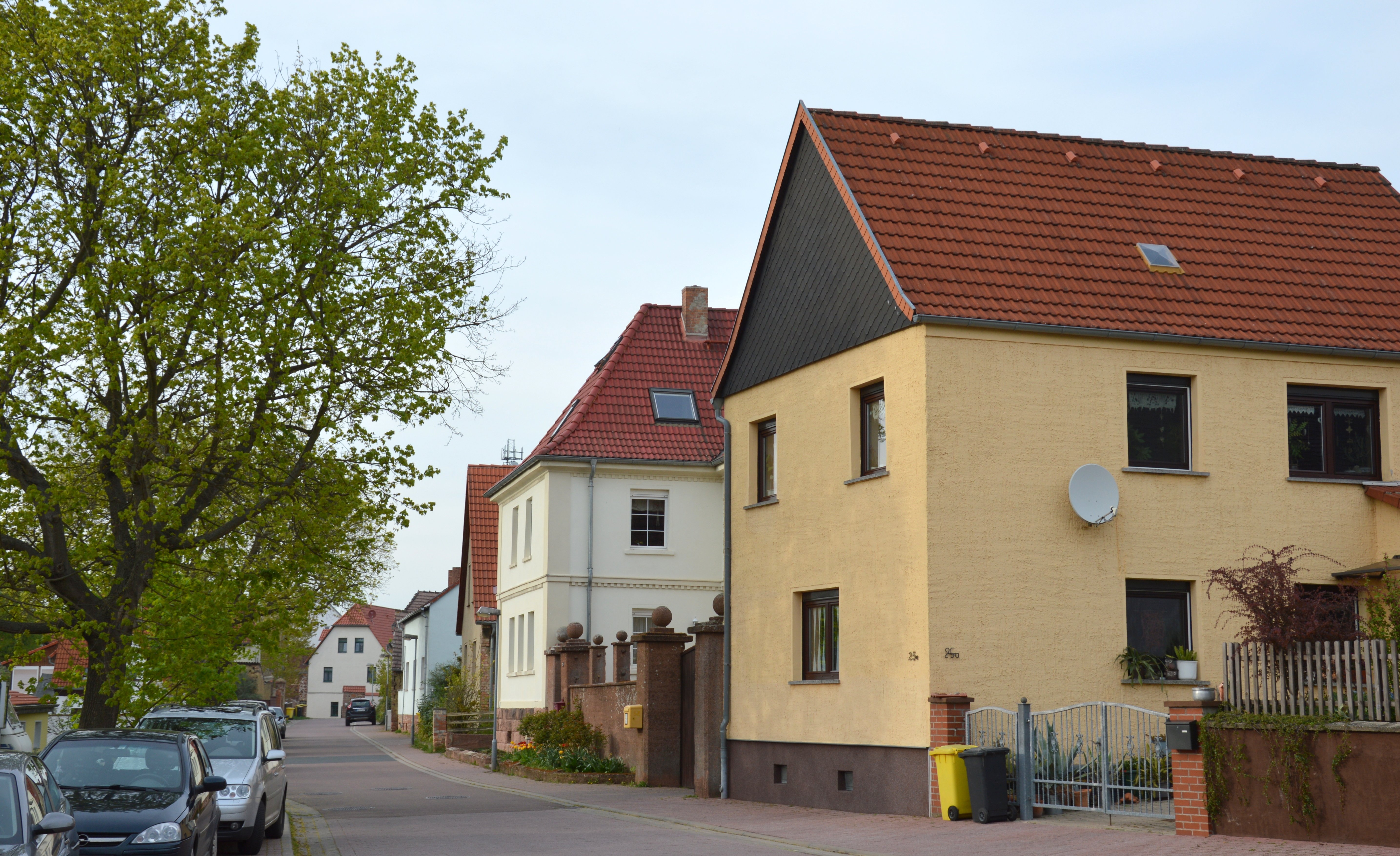 Straße in Möderau